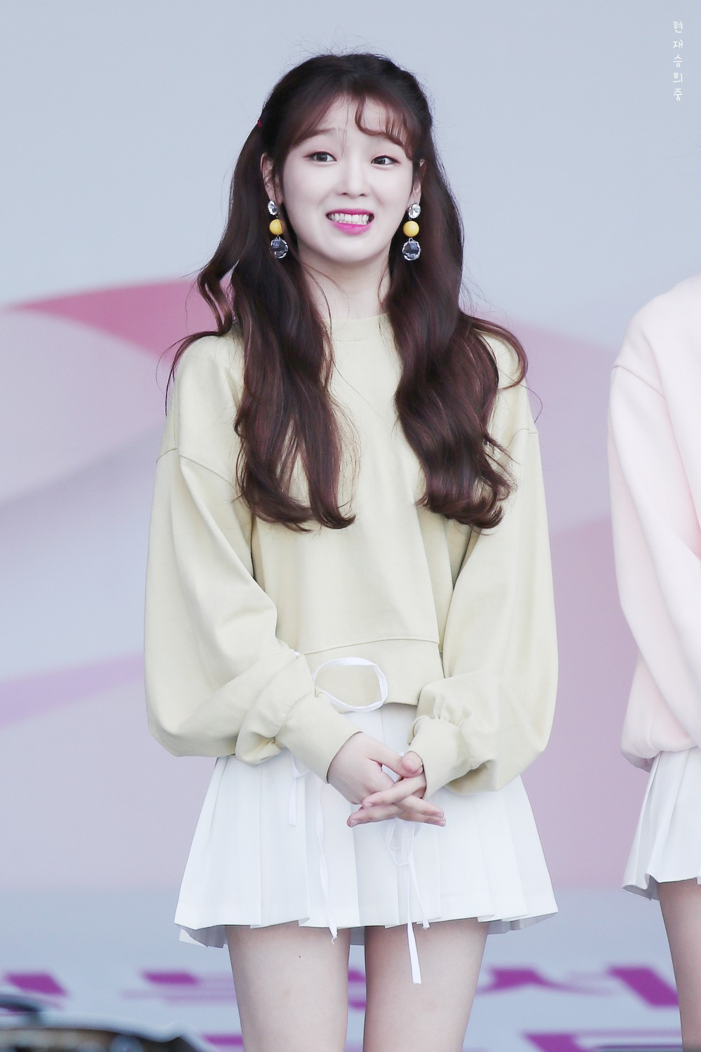 대한민국 나눔대축제 승희